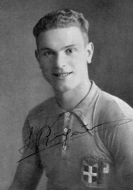 Severino Rigoni